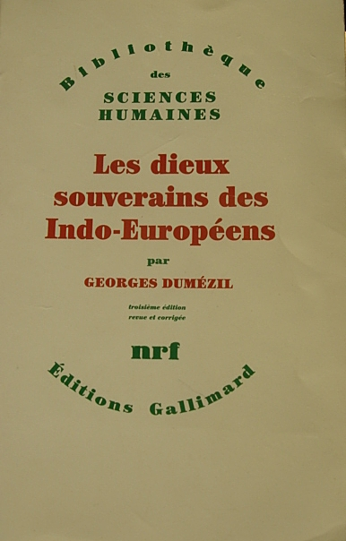 Frontispice du livre : Georges Dumezil, Les dieux souverains des Indo-Européens, Gallimard